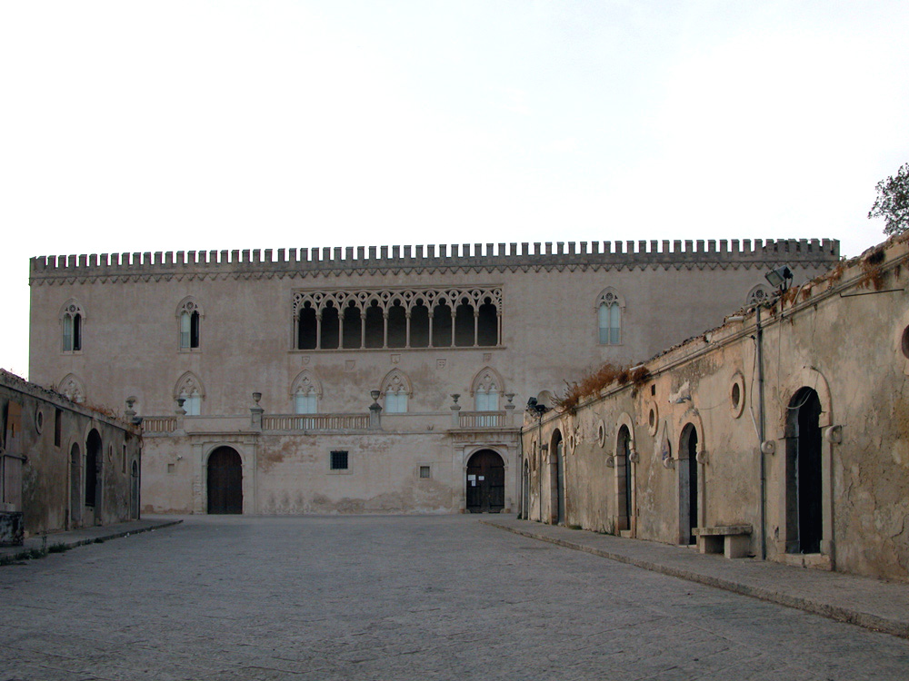 Castello di Donnafugata This is a photo of a monument which is part of cultural heritage of Italy.